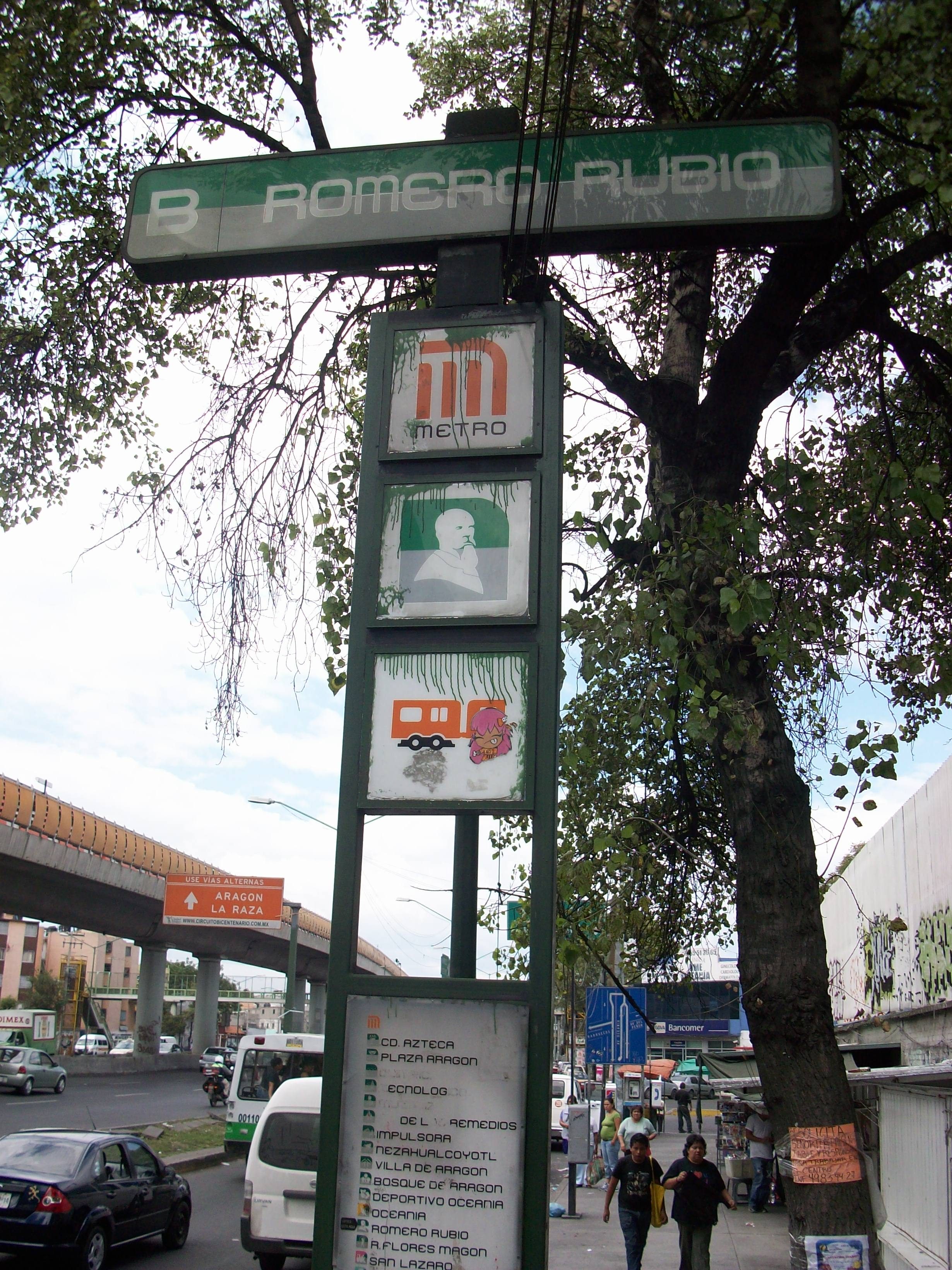 Estela de la estacion Romero Rubio